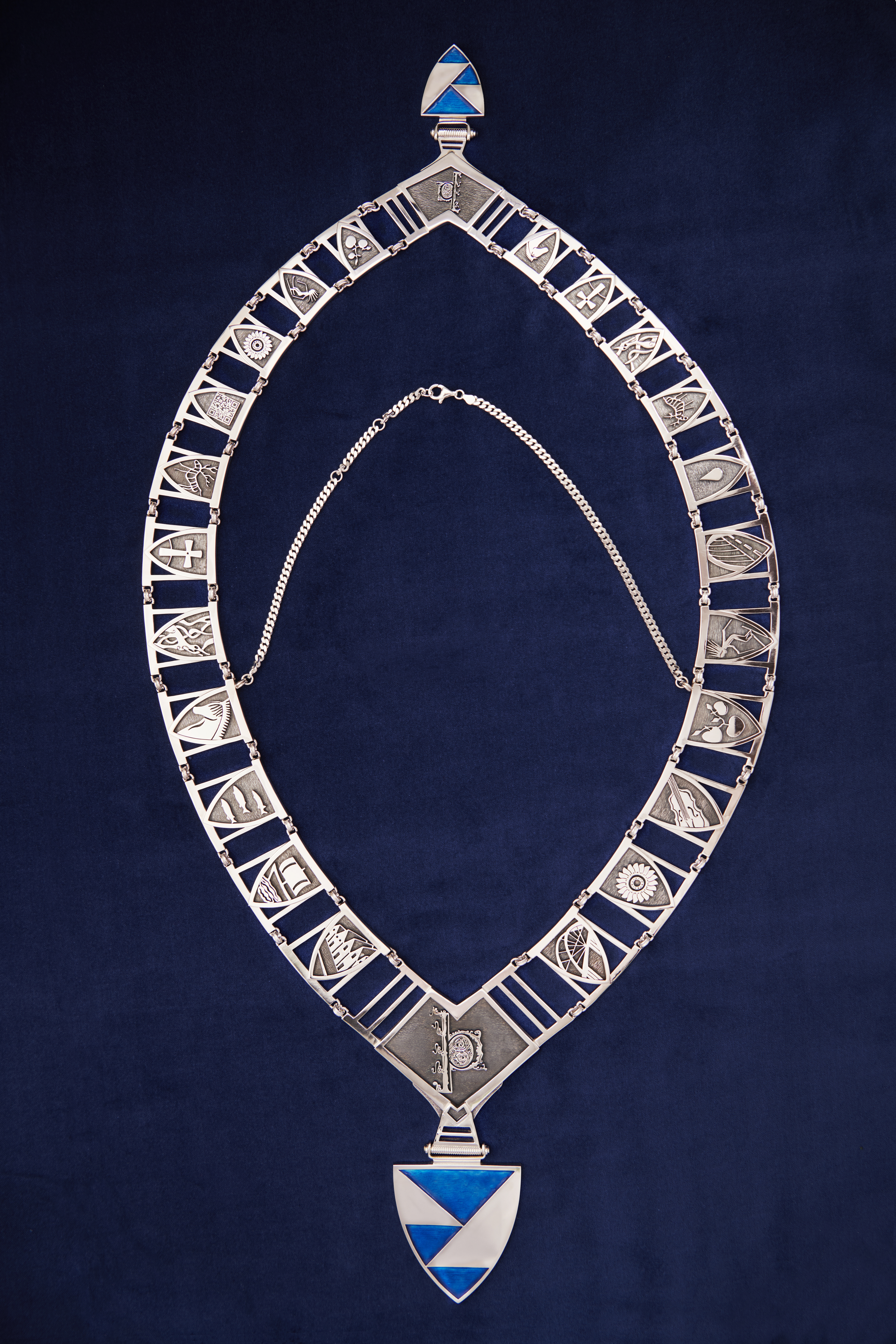 Fylkesordførerkjedet i Vestland fylke. Det er laget av sølvsmed Knut Mykkeltvedt i Fjordsylv AS og billedkunstner Marianne Ose Askvik. Kjedet, som har kostet 320.000 kroner, har 16 motiver fra Vestland. Disse er: Helleristning (hjort) Steinkors Urnesportalen Fjordhest Sild (i flokk) Jekt Bryggen Bru Turbin Hardingfele Eple Friluftsliv (skiløpar) Tunnel Dråpe Bokstaven «þ» fra Gulatingslova QR-kode​ QR-koden er ment å skulle representere den teknologiske alderen vi lever i, og inneholder adresen til en nettside der man kan lese om bakgrunnen til kjedet.